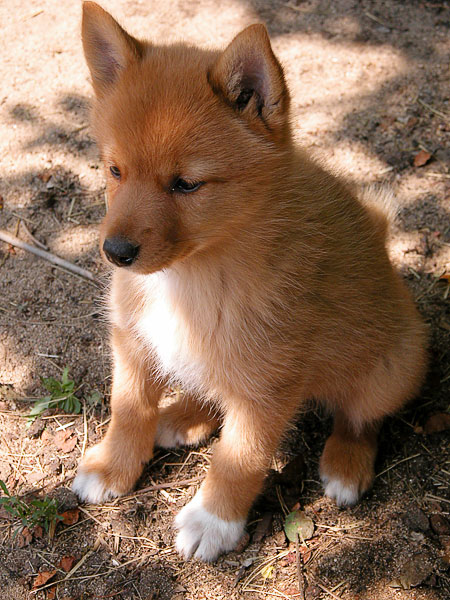 Karelo-Finnish Laika puppy